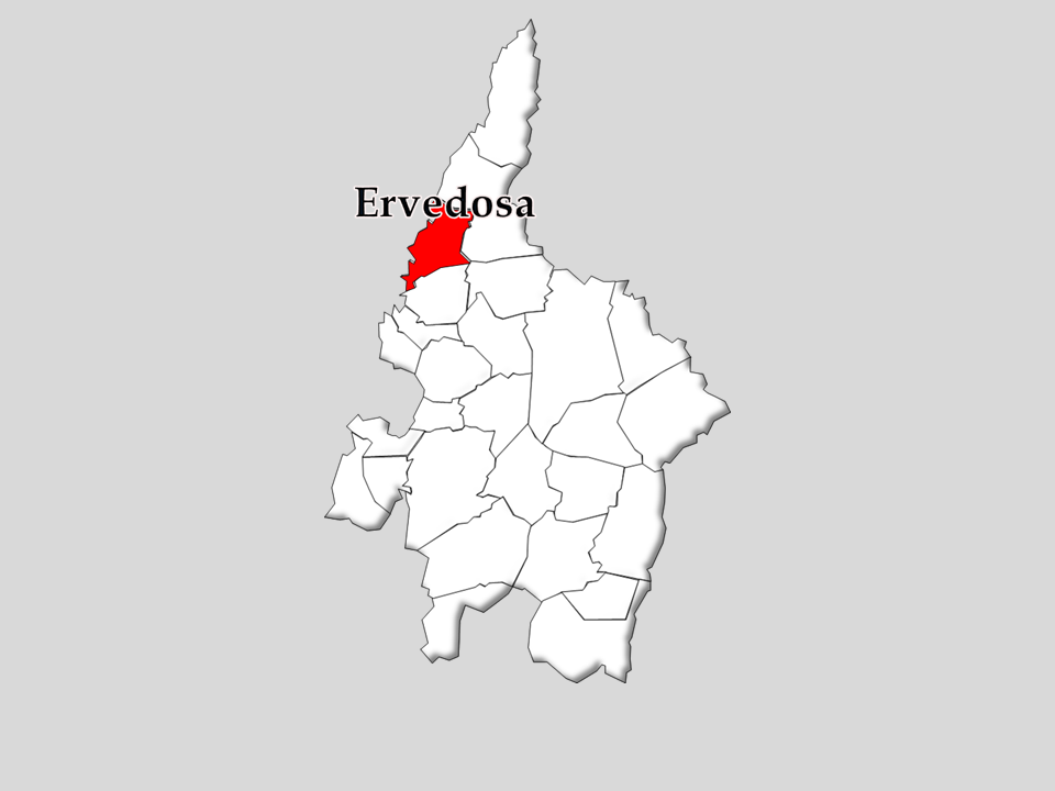 Censos 1864/2011